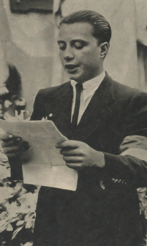 Juan Queraltó (1935), político argentino (1912-1987), fundador y presidente de la Alianza Libertadora Nacionalista.